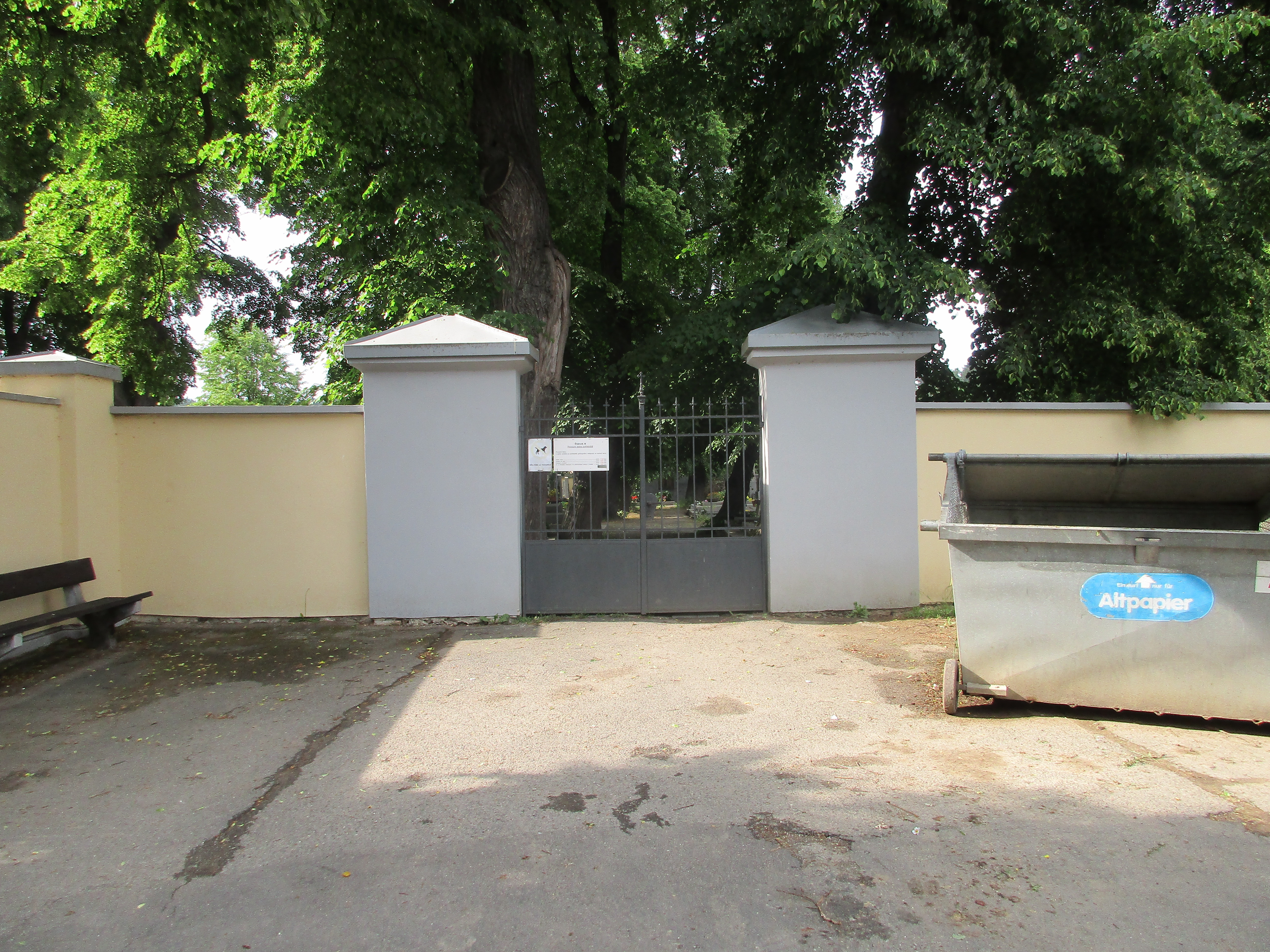 Hřbitov Kunratice - hlavní vstup z ulice Hřbitovní do starší části hřbitova.